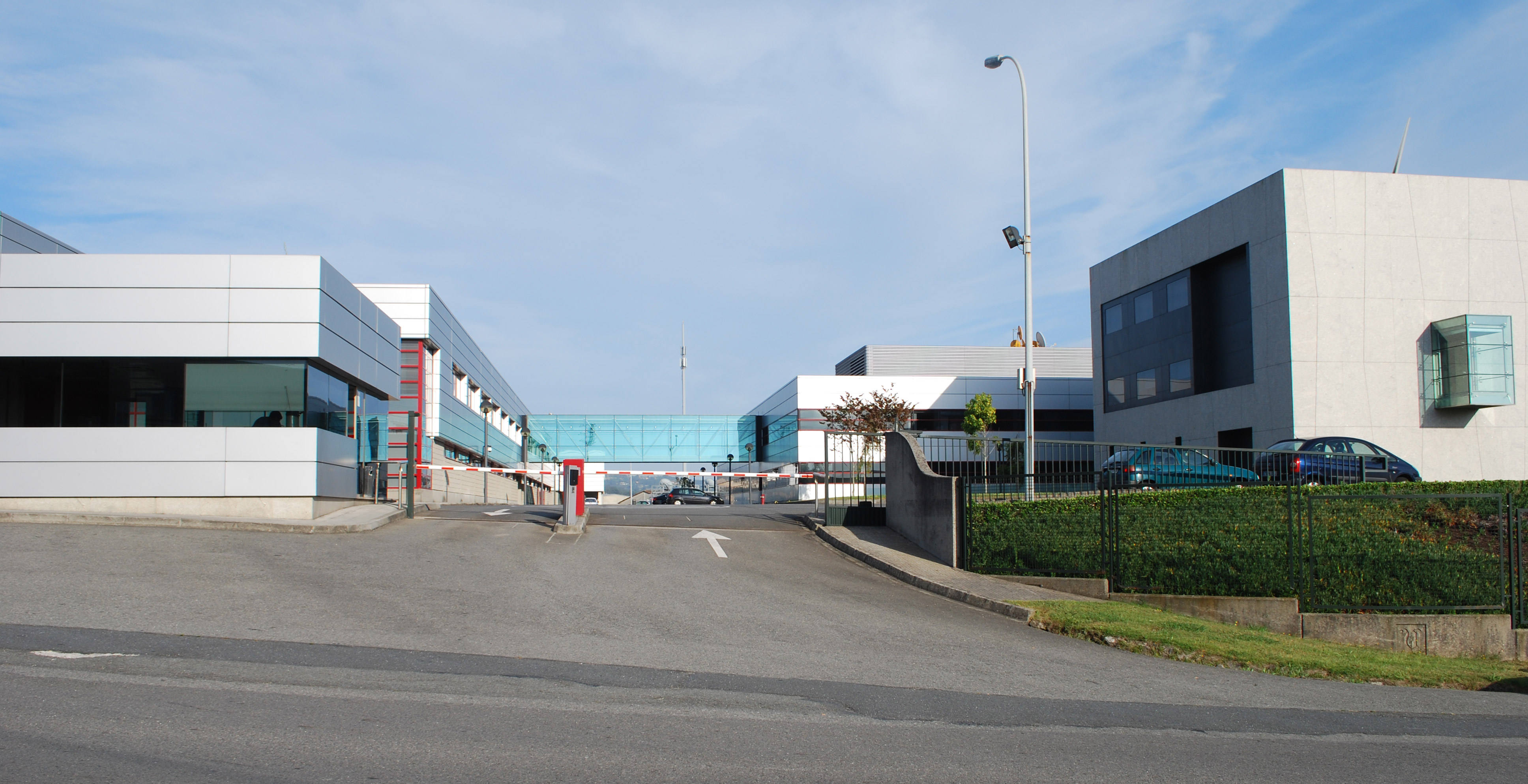 Sede de La Voz de Galicia en Sabón, A Coruña Galiza Spain